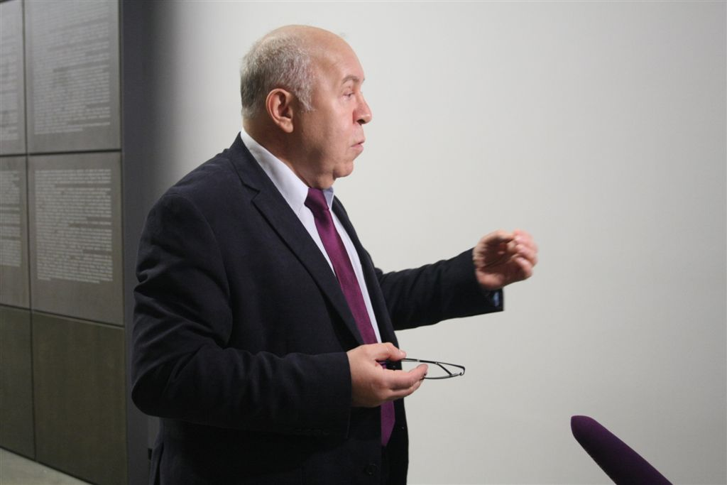 Oleg Witaljewitsch Budnizki, Moskau 2015. Ausstellung "Juden im Zweiten Weltkrieg"